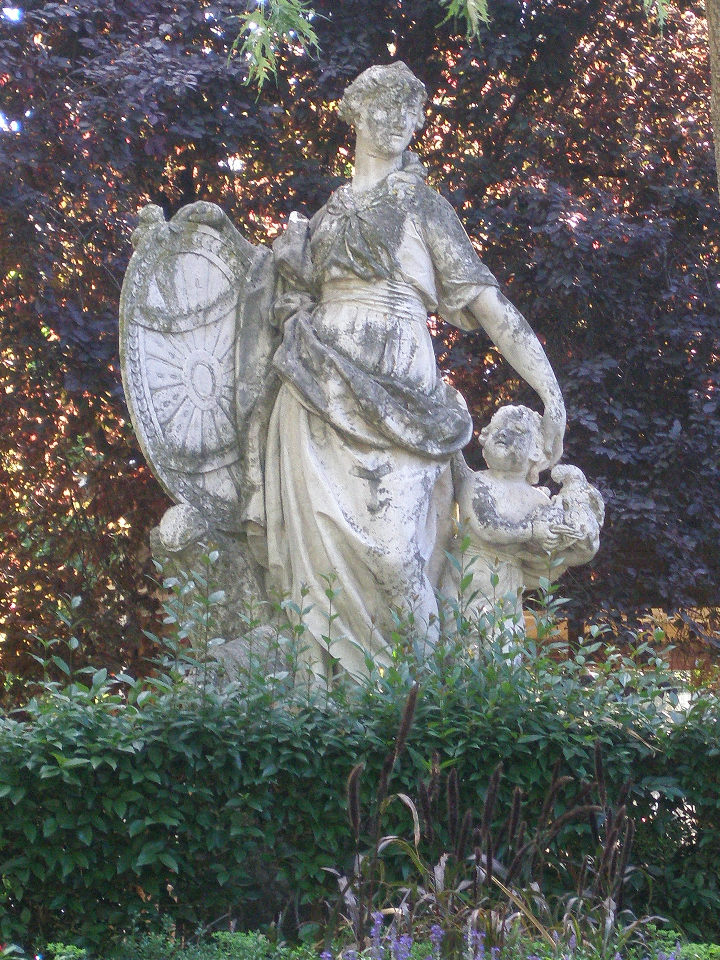 La MariBlanca, estatua del siglo XVIII. Es una alegoría a la Abundancia. Está en los jardines de la Taconera de Pamplona.